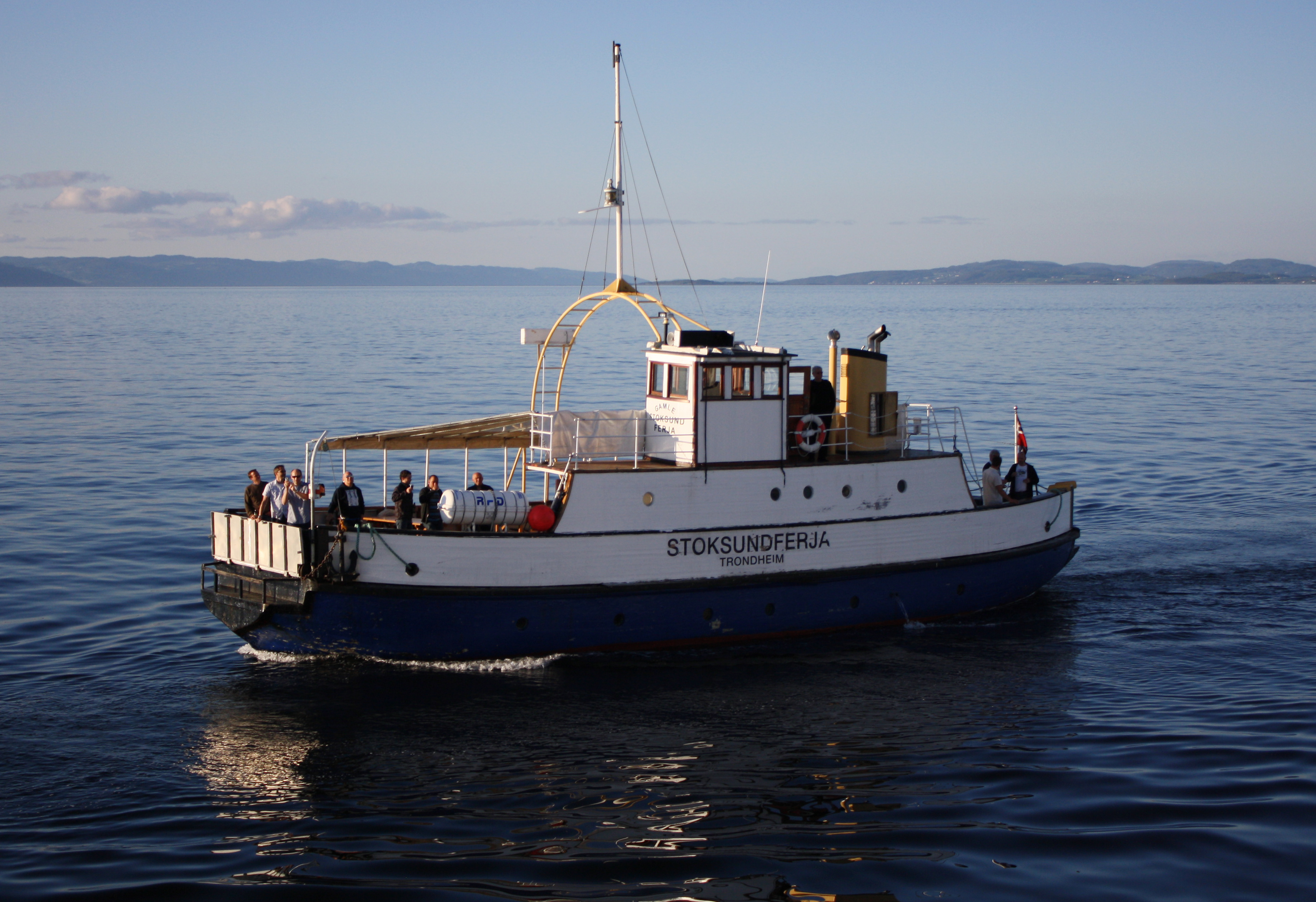 Gamle Stoksundferja